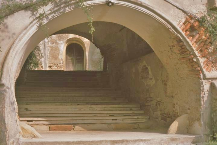 Kirchenburg Hundertbücheln (Movile) Einganstor (1993)